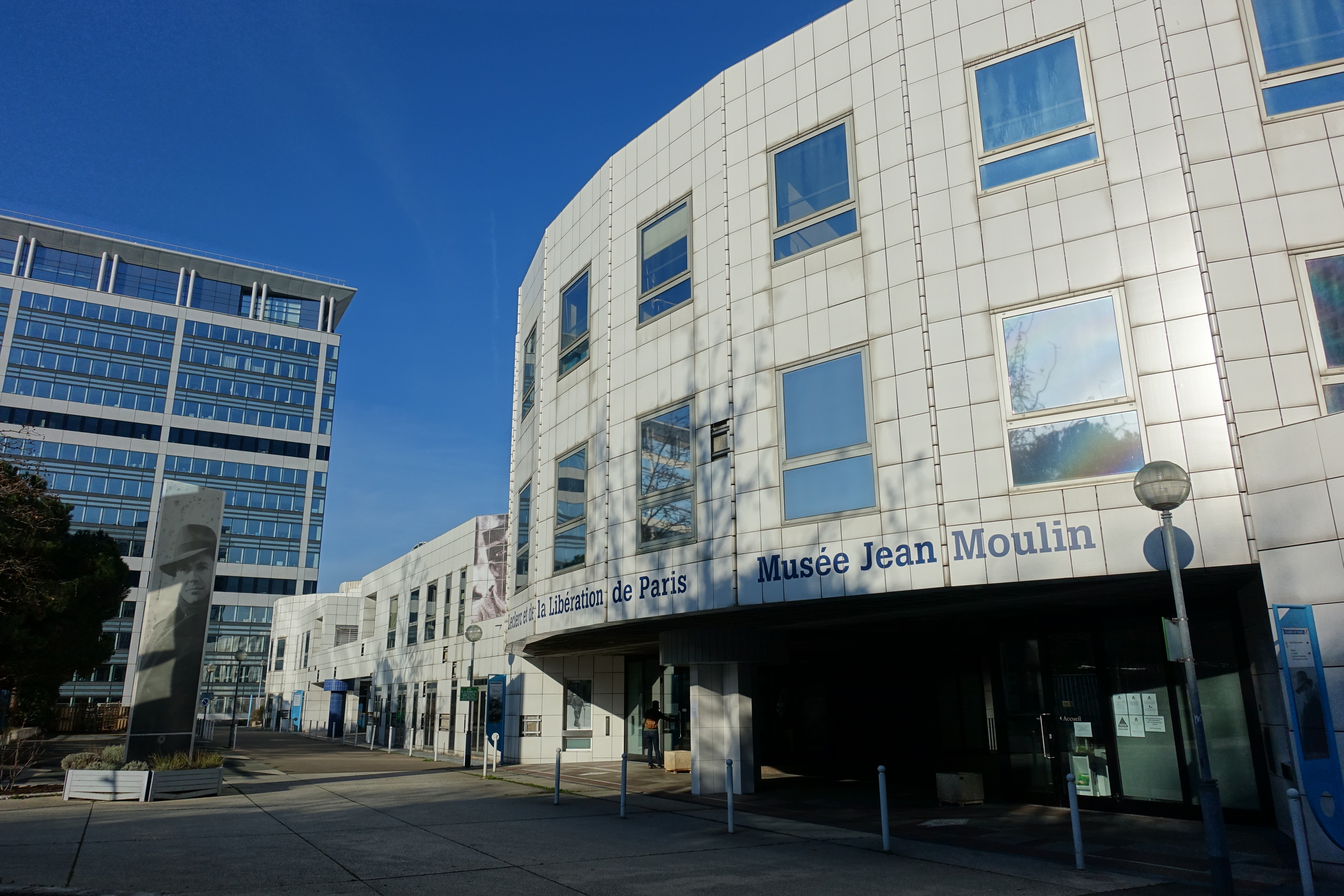 Musée de la Résistance @ Jardin Atlantique @ Paris